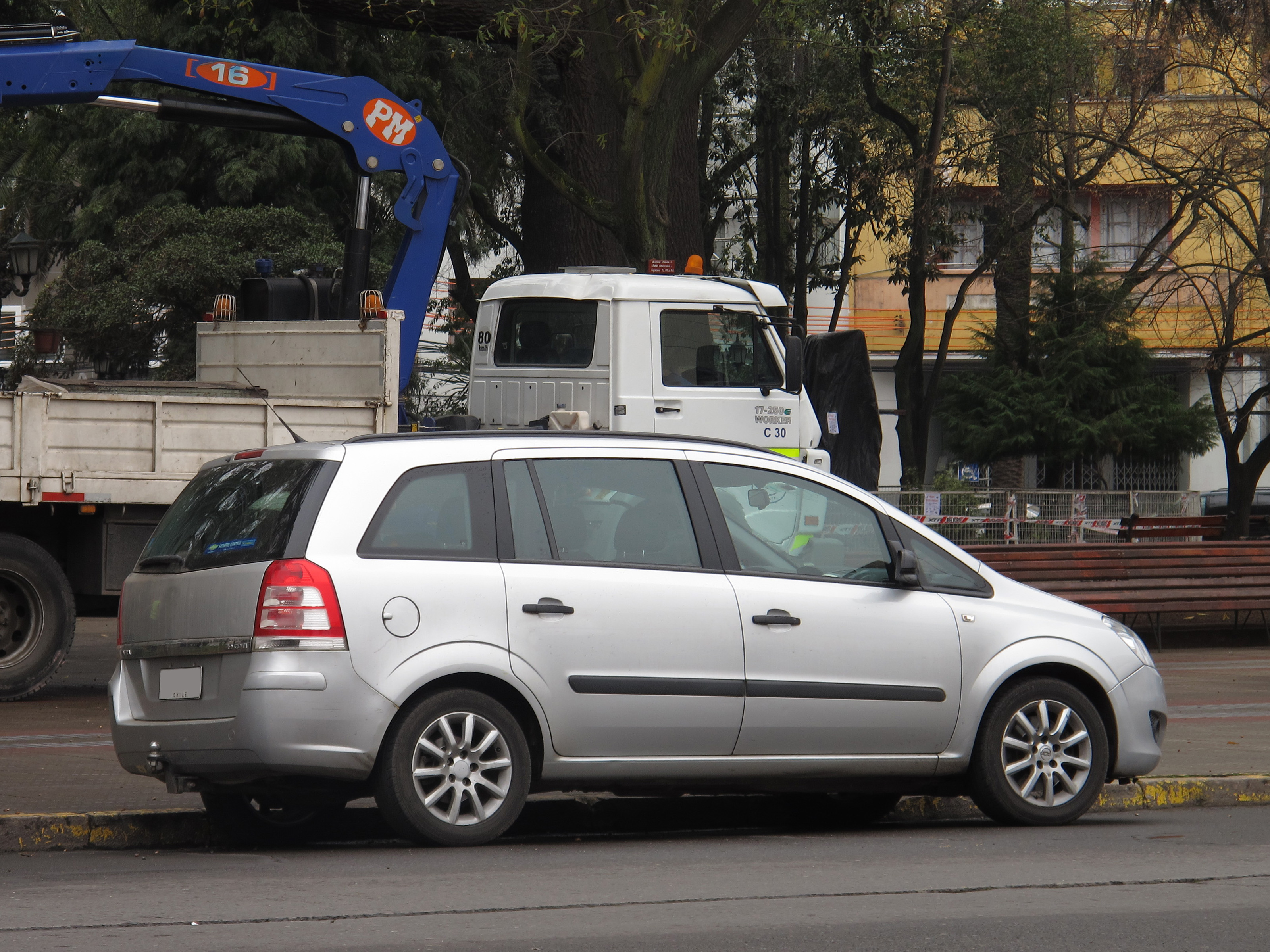 Chevrolet Zafira 1.9 CDTi Essentia 2009